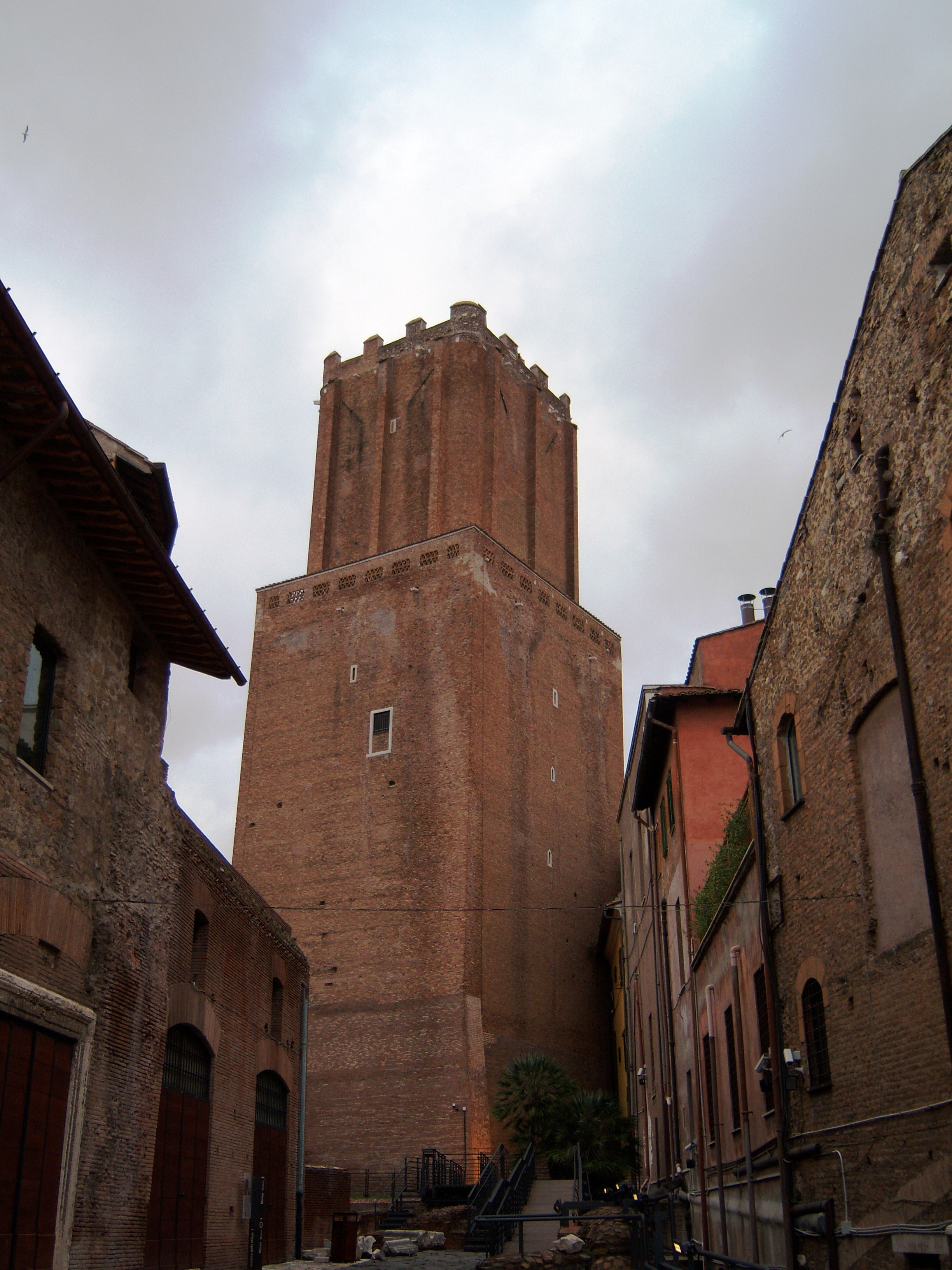 Torre delle Milizie, Roma (Italia).